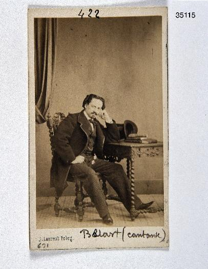 Buenaventura Belart, fotografía de J. Laurent. Museo de Historia de Madrid